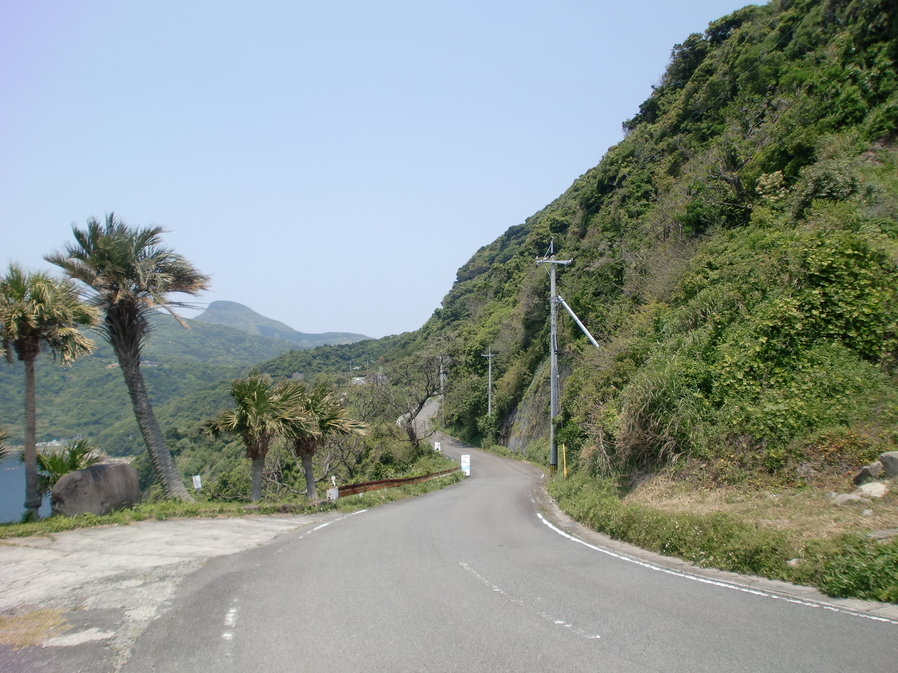 国道226号を黒瀬海岸付近から加世田方面に望む。